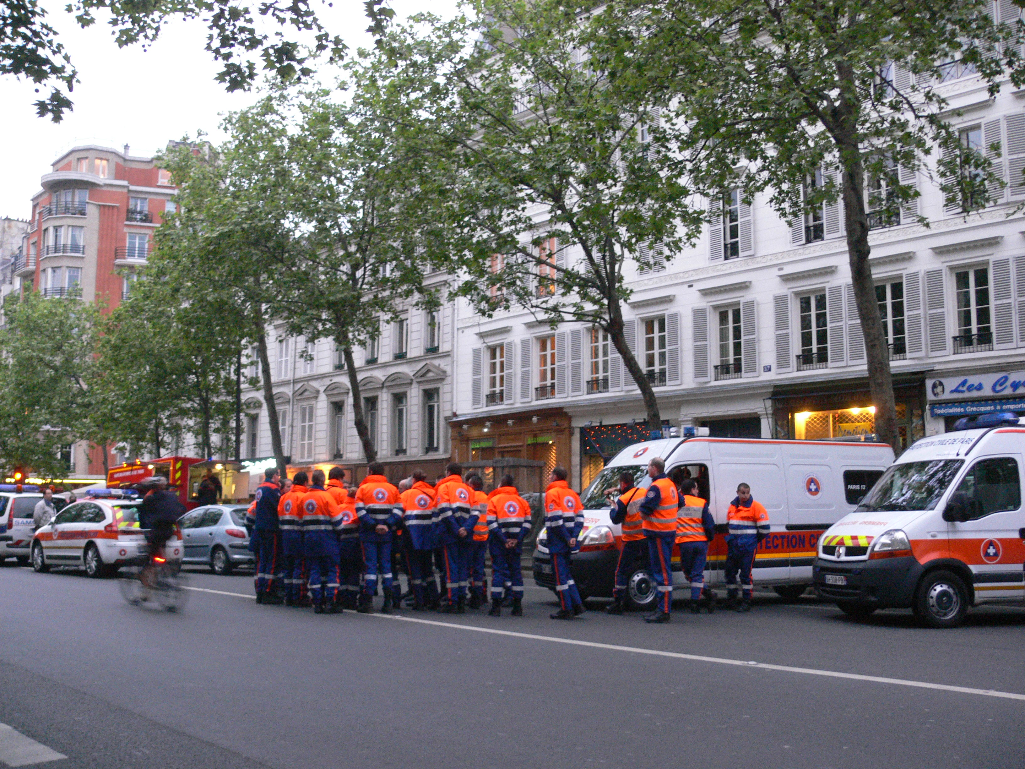 2012 French presidential election